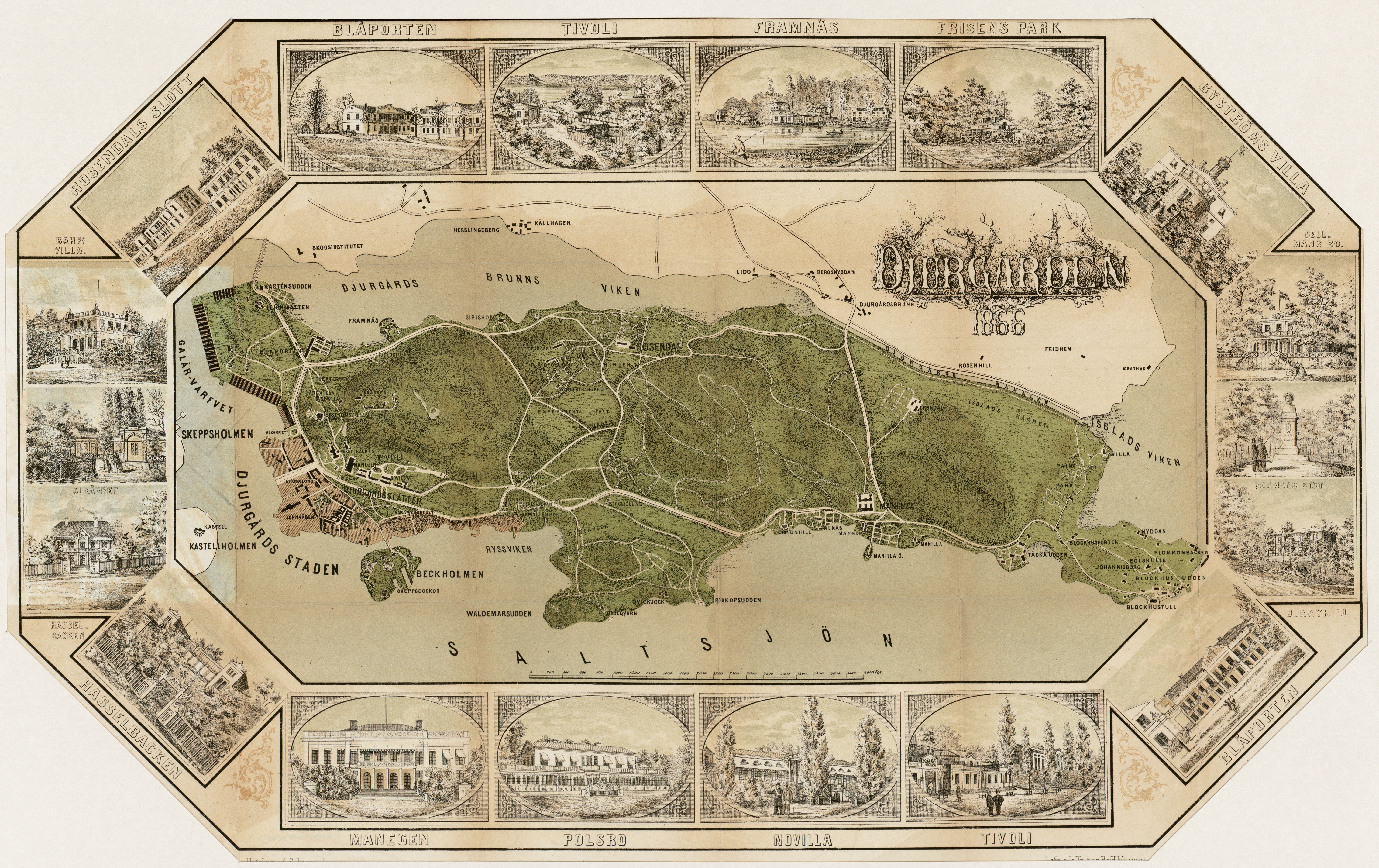 KARTADjurgården 1866. Utgifven af S. Leczinsky. Lith. och Tr. hos Ph. H. MandelSituationsplan över Djurgården. Litografiskt tryck. Inramad med 18 illustrationer med rubrikerna: Blåporten, Tivoli, Framnäs, Frisens park, Byströms villa, Bellmans ro, Jennyhill, Novilla, Polsro, Manegen, Hasselbacken, Alkärret, Bährs villa.Stockholms stadsmuseum, Sweden